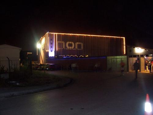 Vista exterior de la discoteca NON